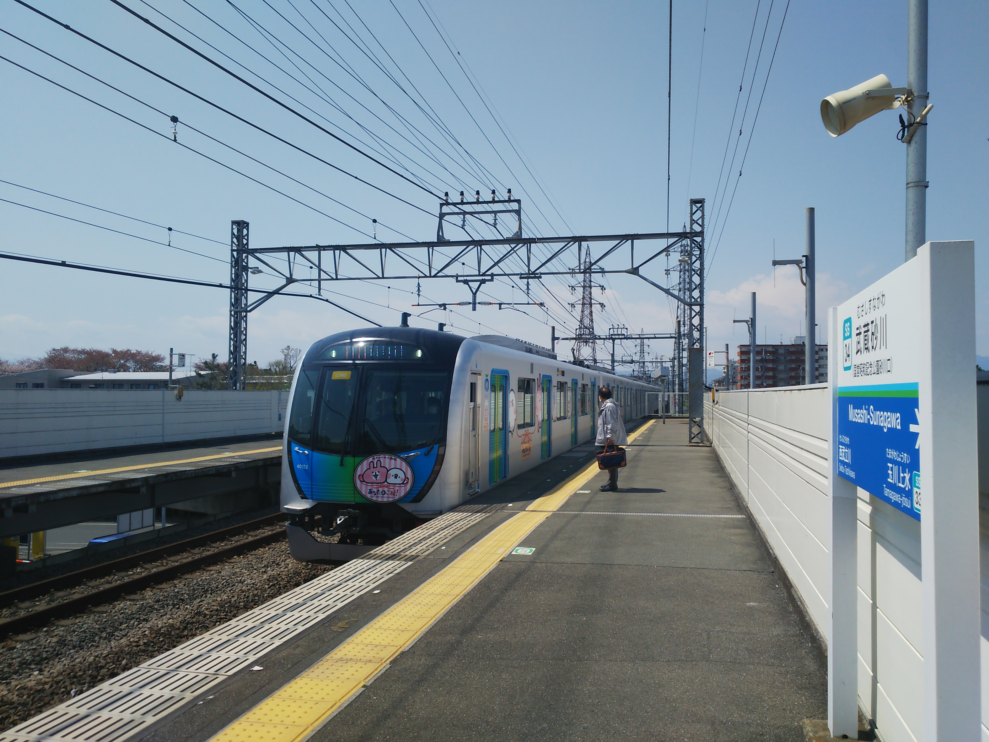 西武拝島線武蔵砂川駅 上りホームに到着する40000系車両 2020年4月9日撮影